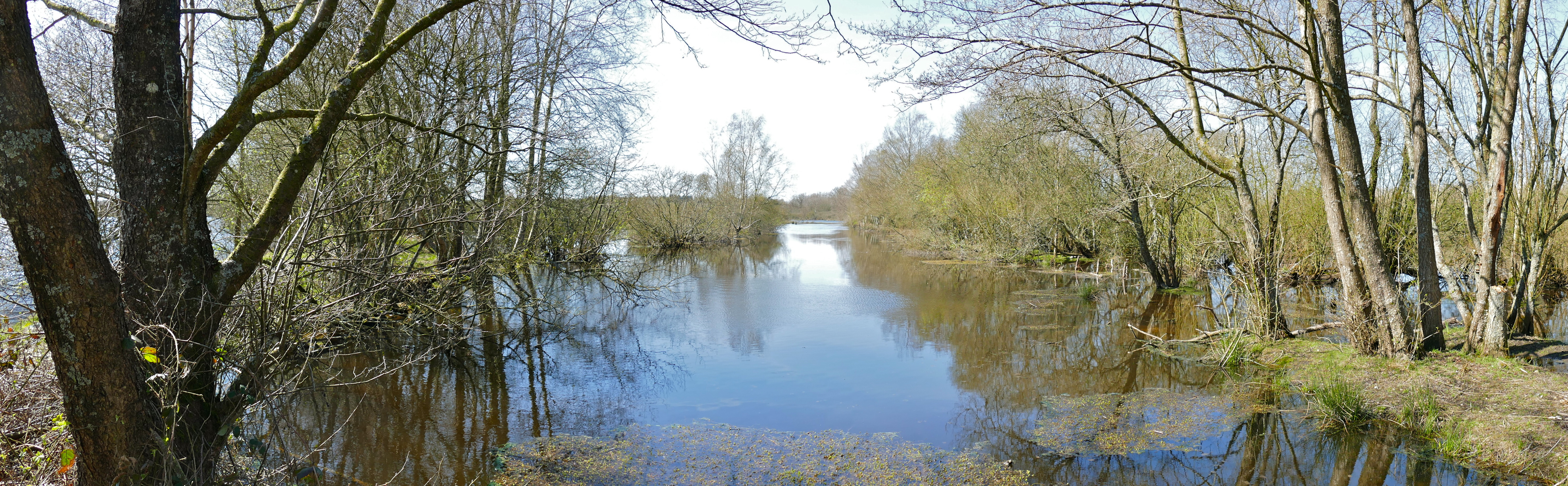 Marais du Grand Hazé, Briouze, Orne, FRANCE